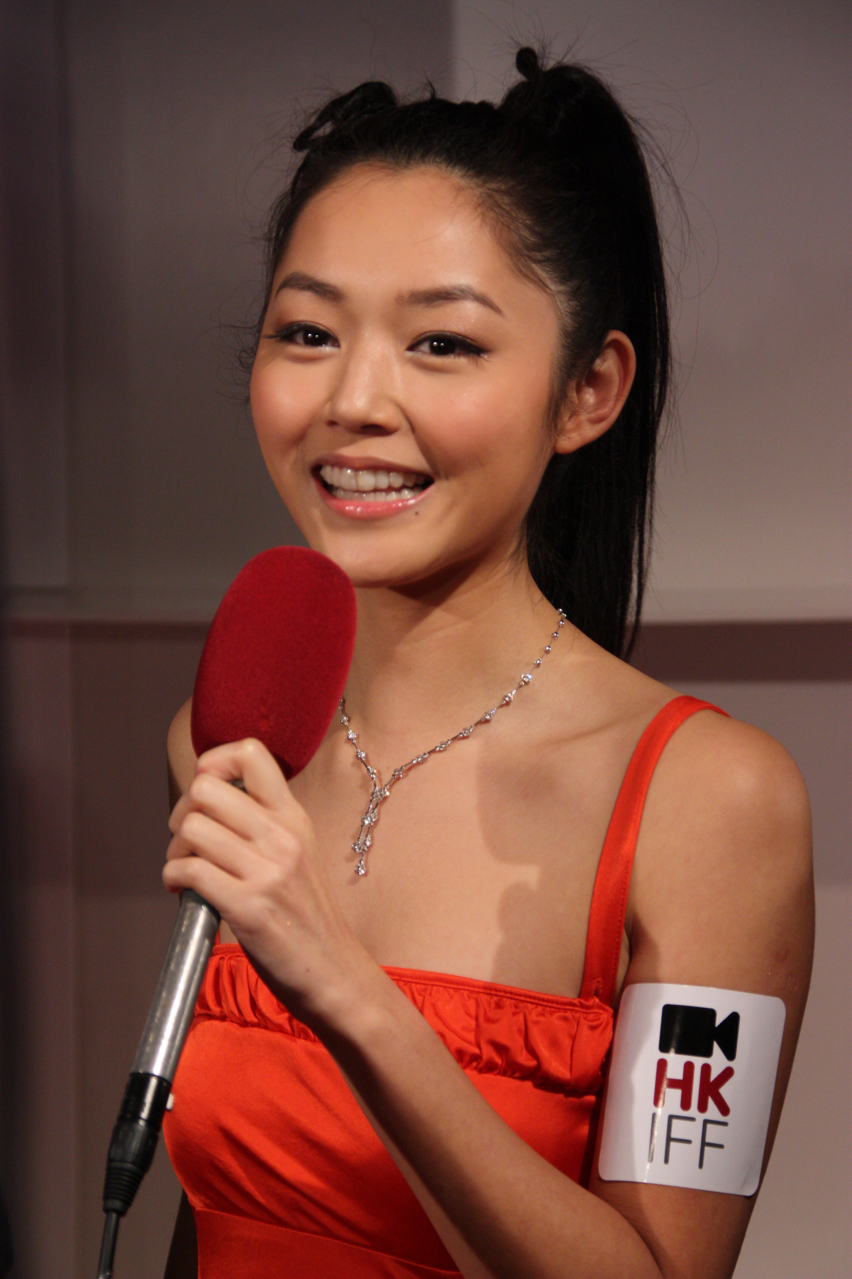 诗雅